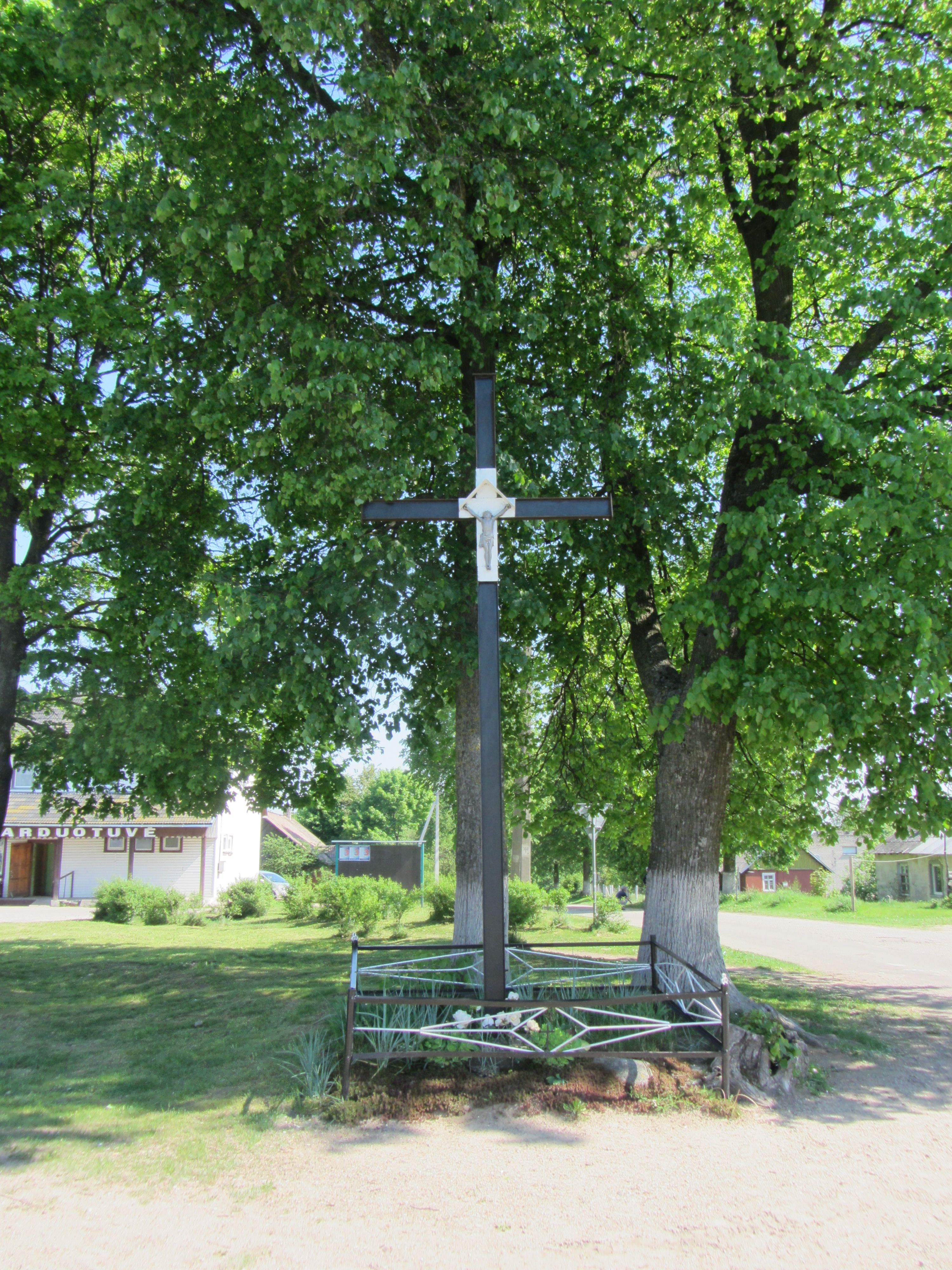 Veriškės 15164, Lithuania